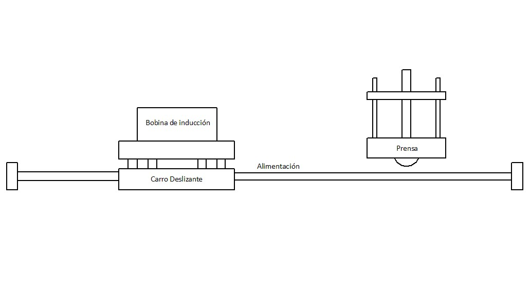 Esquema de soldadura de termoplásticos por inducción